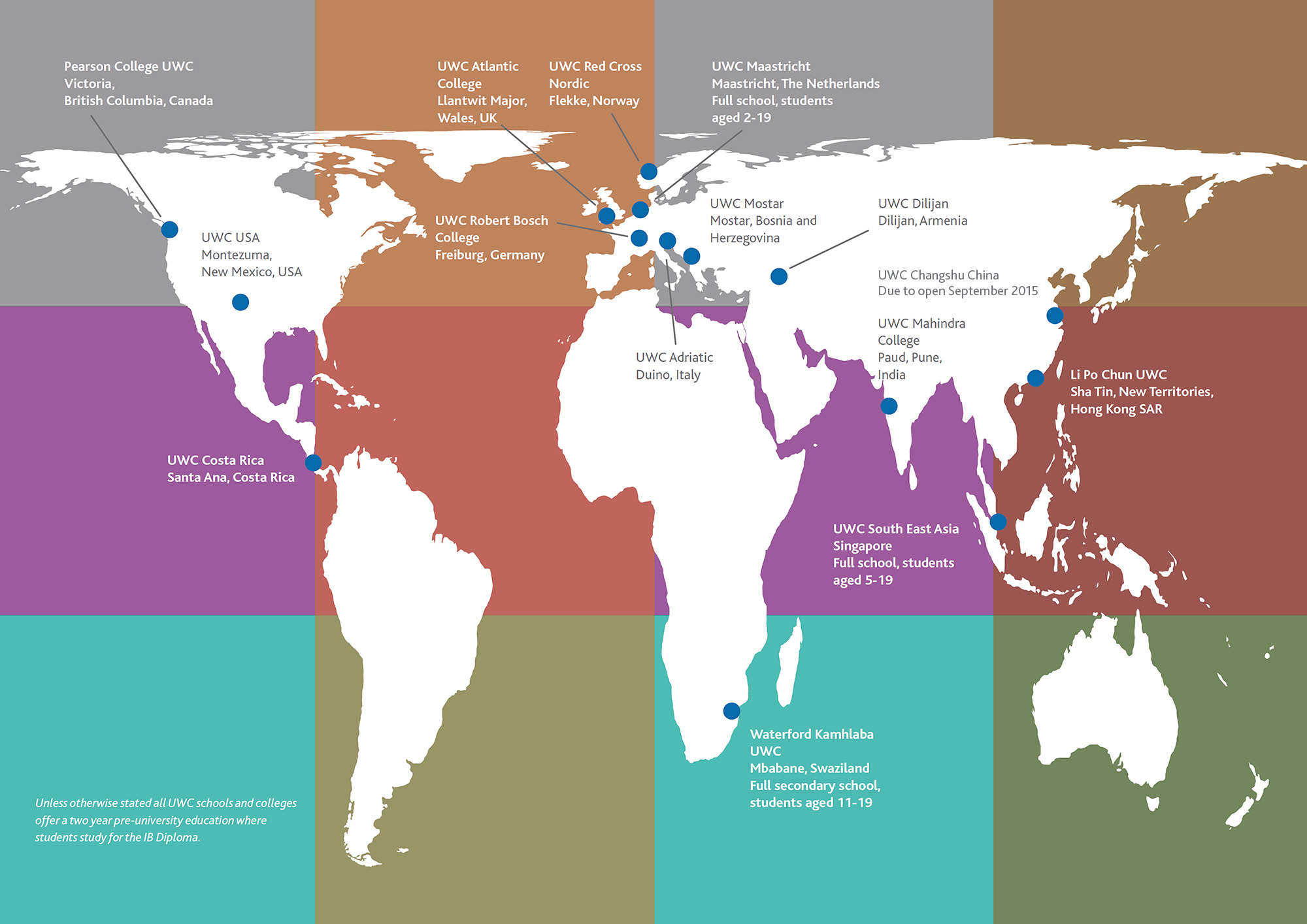 Localização dos 15 UWC em todo o mundo